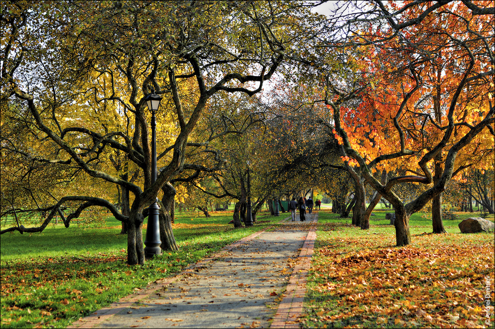 Краявіды Мінска